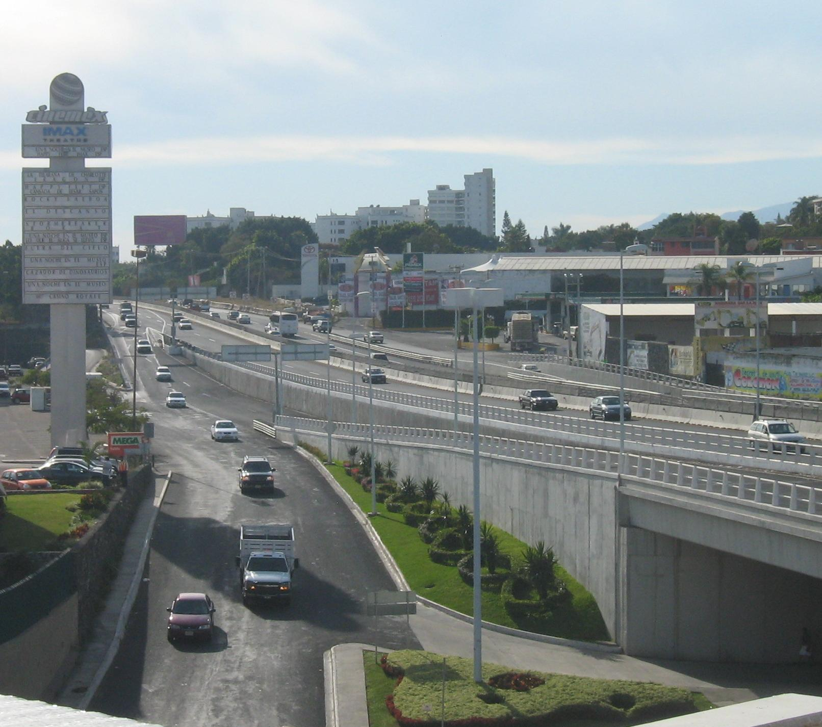 Cuernavaca, Morelos, México